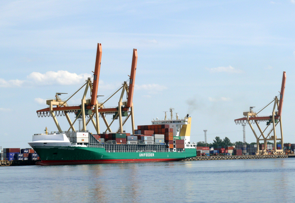 Rīgas ostas konteineru termināls. Fotogrāfējis A.Buks 17.07.2009.